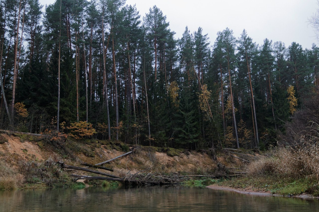 Река Вопь в нижнем течении